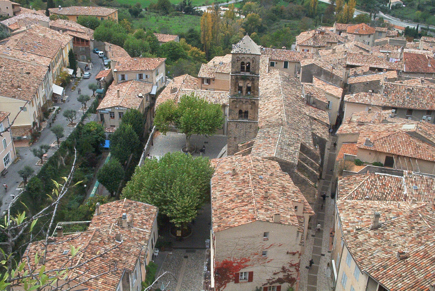 Vue du village provençal de Moustiers-Sainte-Marie, dans le département des Alpes-de-Haute-Provence (04), en France A view of Moustiers-Sainte-Marie, a small village in Provence, France